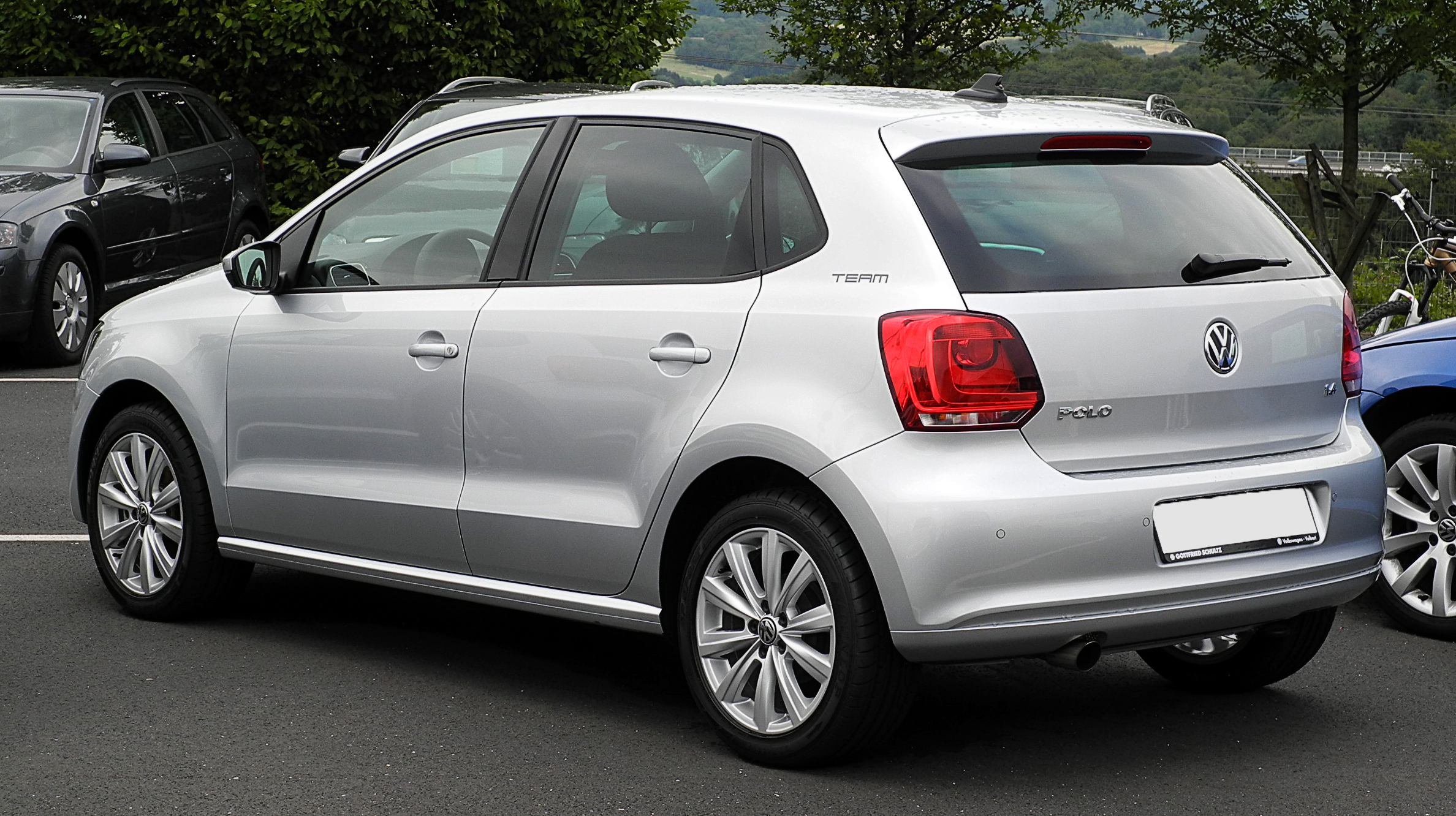 VW Polo 1.4 Team (V)